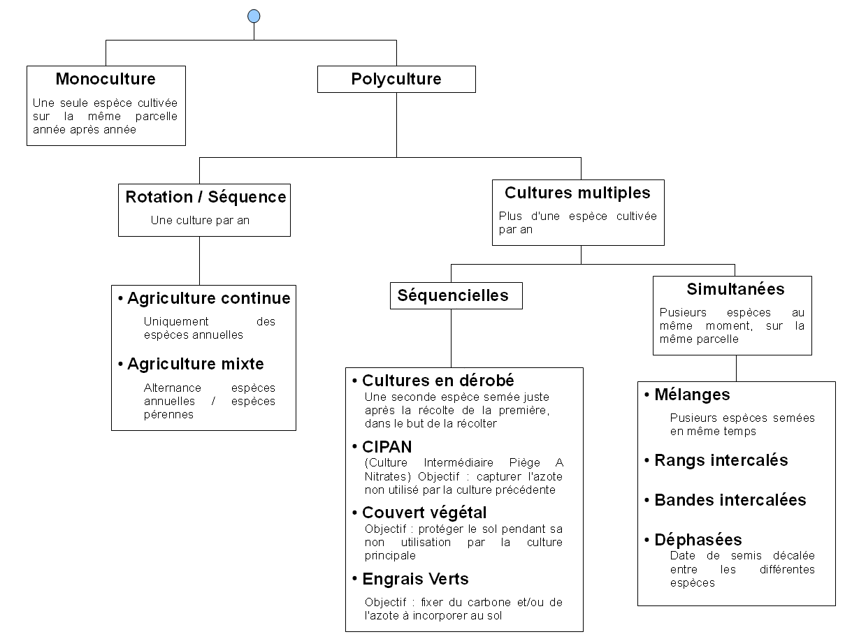 Classification des différentes séquences de cultures